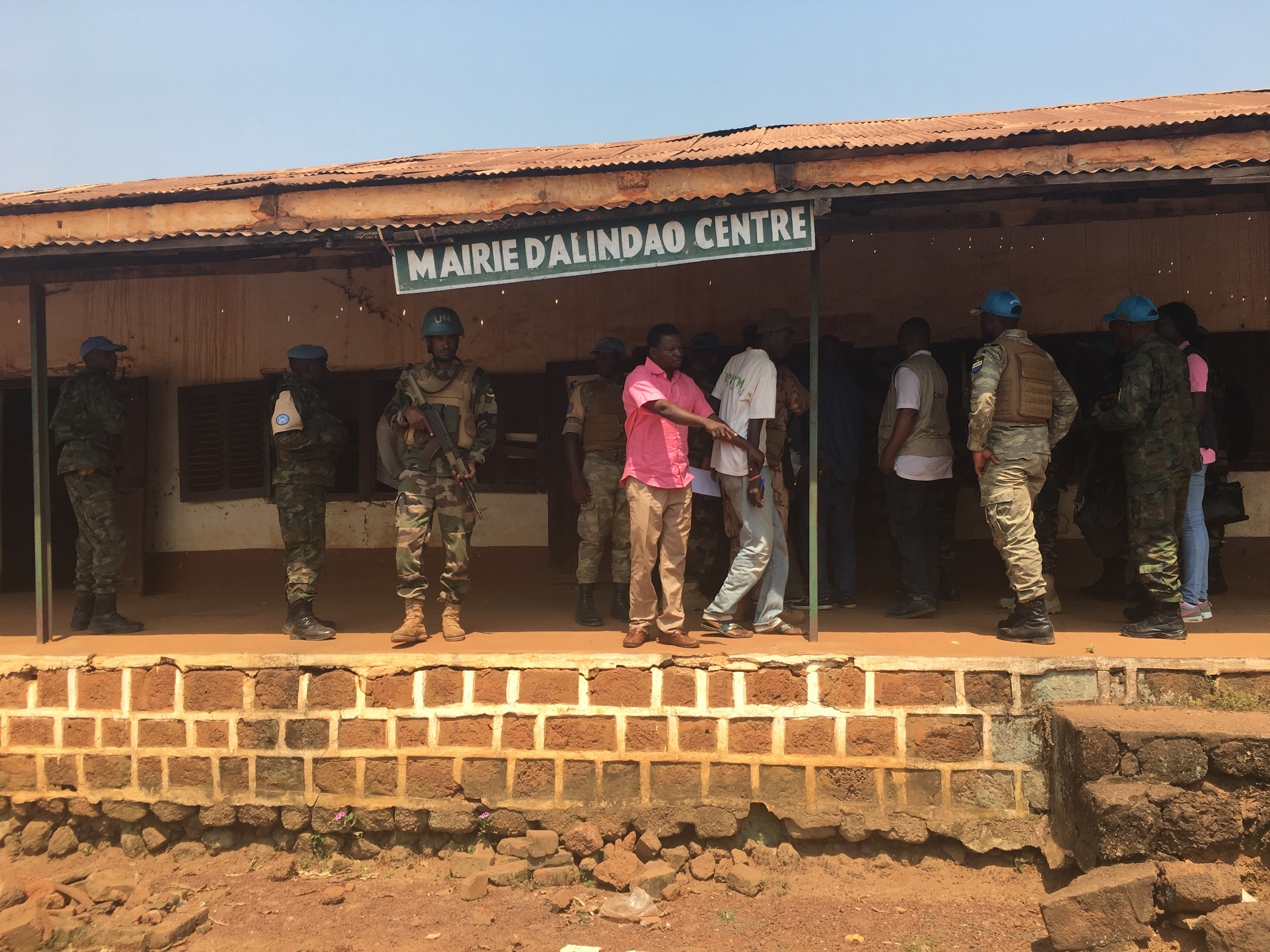 La mairie d’Alindao, à 400 km au sud-est de Bangui, Centrafrique, 29 novembre 2018. (VOA/ Felix Yepassis-Zembrou)